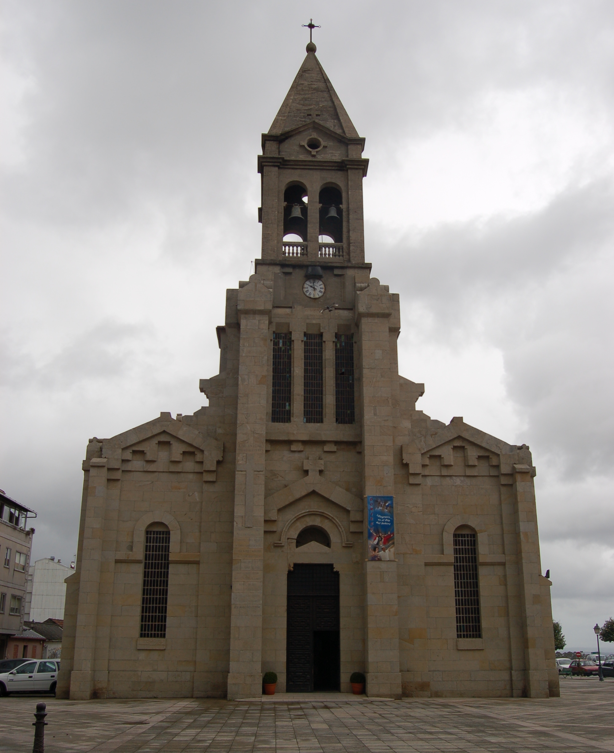 Igrexa parroquial de San Paio da Estrada (A Estrada)